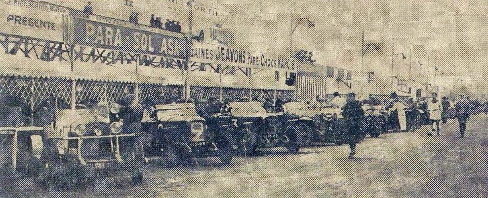 Départ des 24 Heures du Mans 1926.